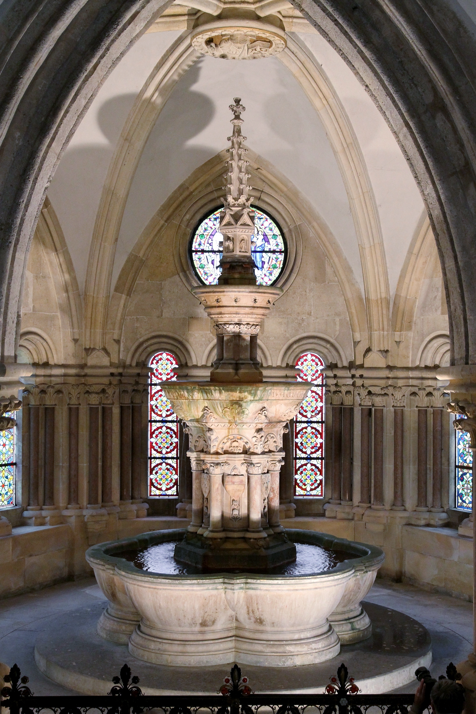 Das von Dominik Avanzo in den Jahre 1886/87 im neugotischen Stil errichtete Brunnenhaus im Stift Lilienfeld. An Stelle des ehemaligen Brunnenhauses, welches beim Großbrand 1810 zerstört wurde, erbaut. Ein sechsseitiger Zentralbau mit verschindeltem Pyramidendach und im Zentrum ein Springbrunnen mit 3 Schalen.